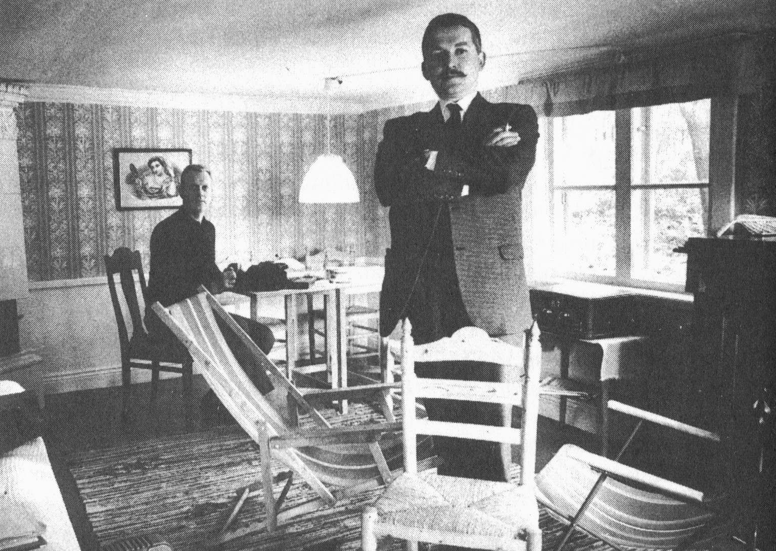 Hasse Alfredson och Tage Danielson i sin skrivstuga